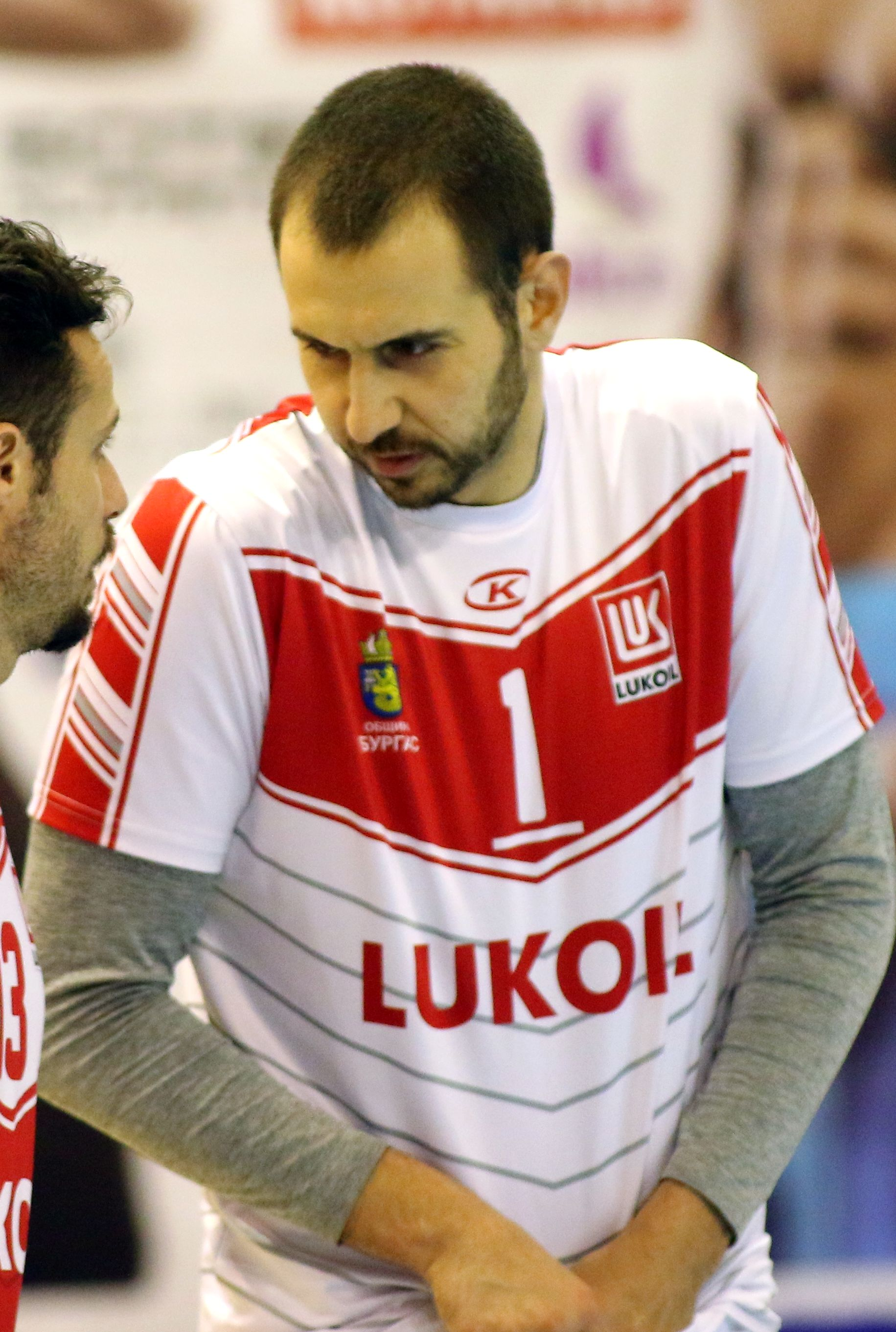 Георги Сашков Братоев е български национален състезател по волейбол. Играе на поста посрещач. Има брат близнак- Валентин Братоев, който също е национален състезател.